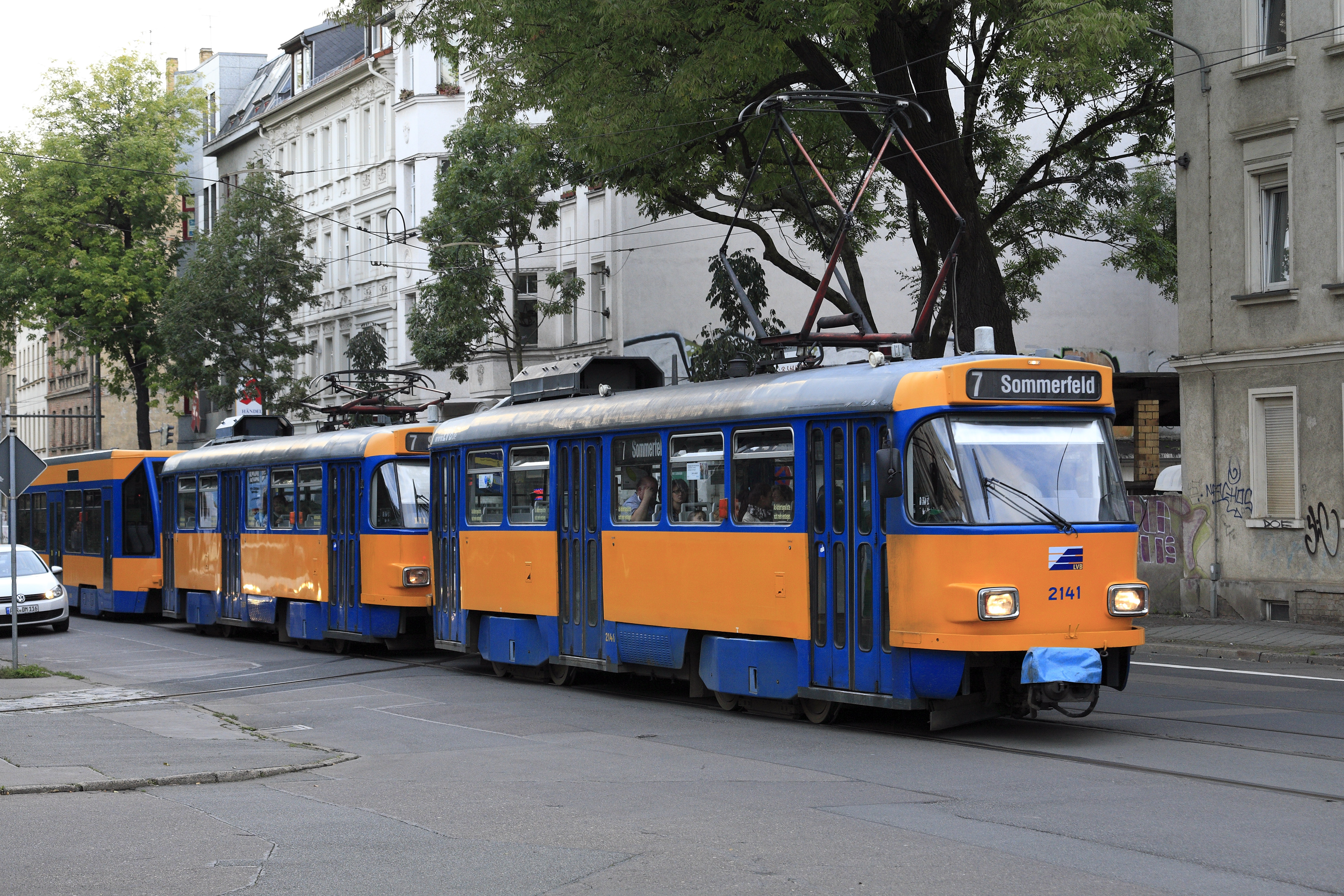 Dreiwagenzug mit Niederflurbeiwagen nach Sommerfeld, Typen 33c und 68. Das kreuzende Gleis ist das Ausfahrgleis aus der Wendeschleife Sellerhausen (Emmausstraße) Richtung Stadt.